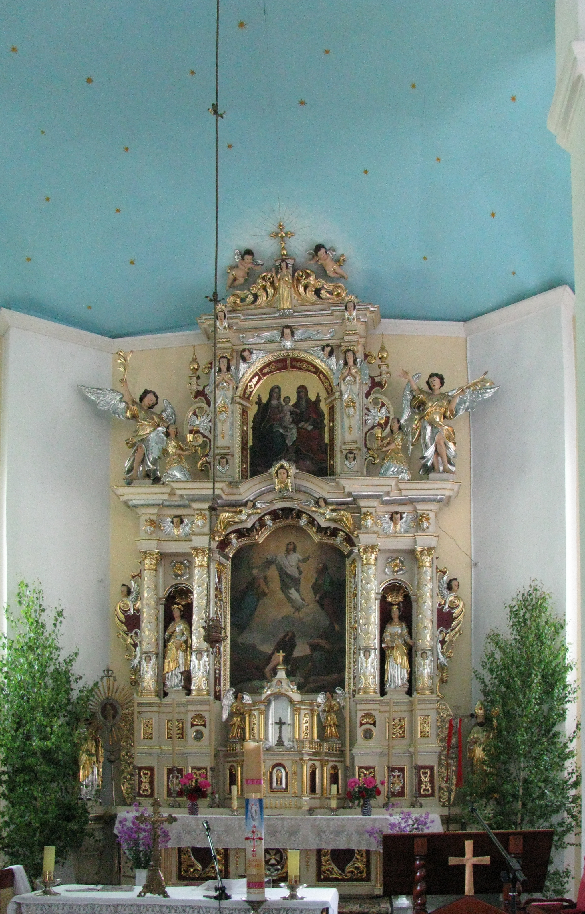 Беларуская (тарашкевіца): Праабражэнскі касьцёлдэкаратыўнае ўбраньне: альтары, амбон, арган. в. Новая Мыш This is a photo of Belarusian heritage monument. Reference number: 112Г000060 ( WLM)